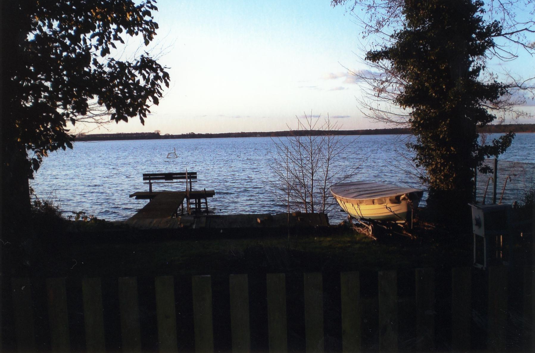 Bootssteg am Abend